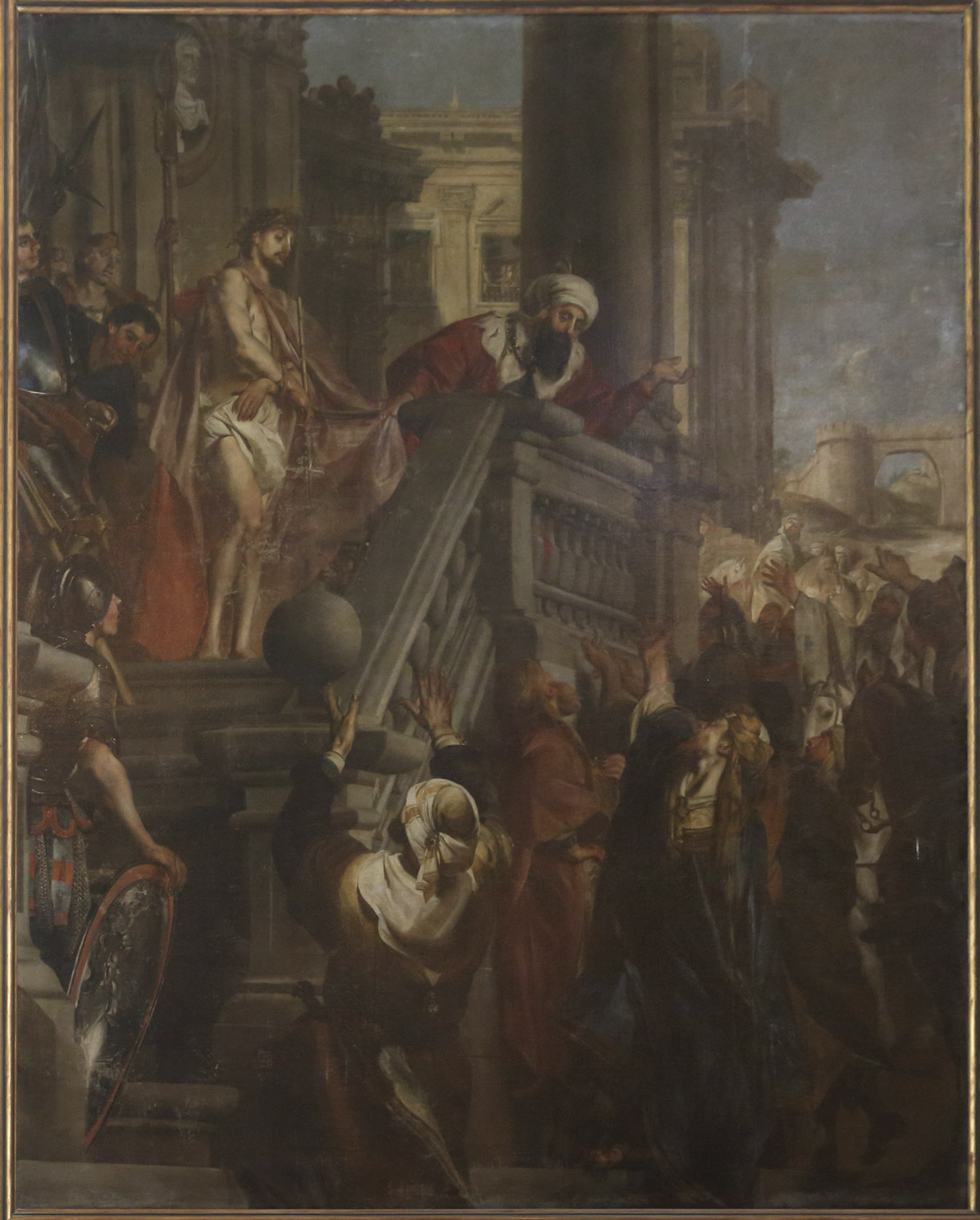 Cristo presentado por Pilatos, óleo sobre lienzo, Madrid, Capilla del Cristo de los Dolores de la VOT